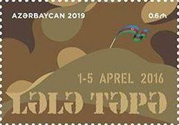 Aprel döyüşləri-2016. Lələ Təpə